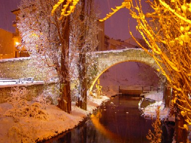 Puente Romano Foto del Puente Románico de Aranda, ubicado en el barrio de Tenerías, y más conocido como "Puente Romano", en la nevada que cayó en Aranda el 26 de Diciembre de 2004.